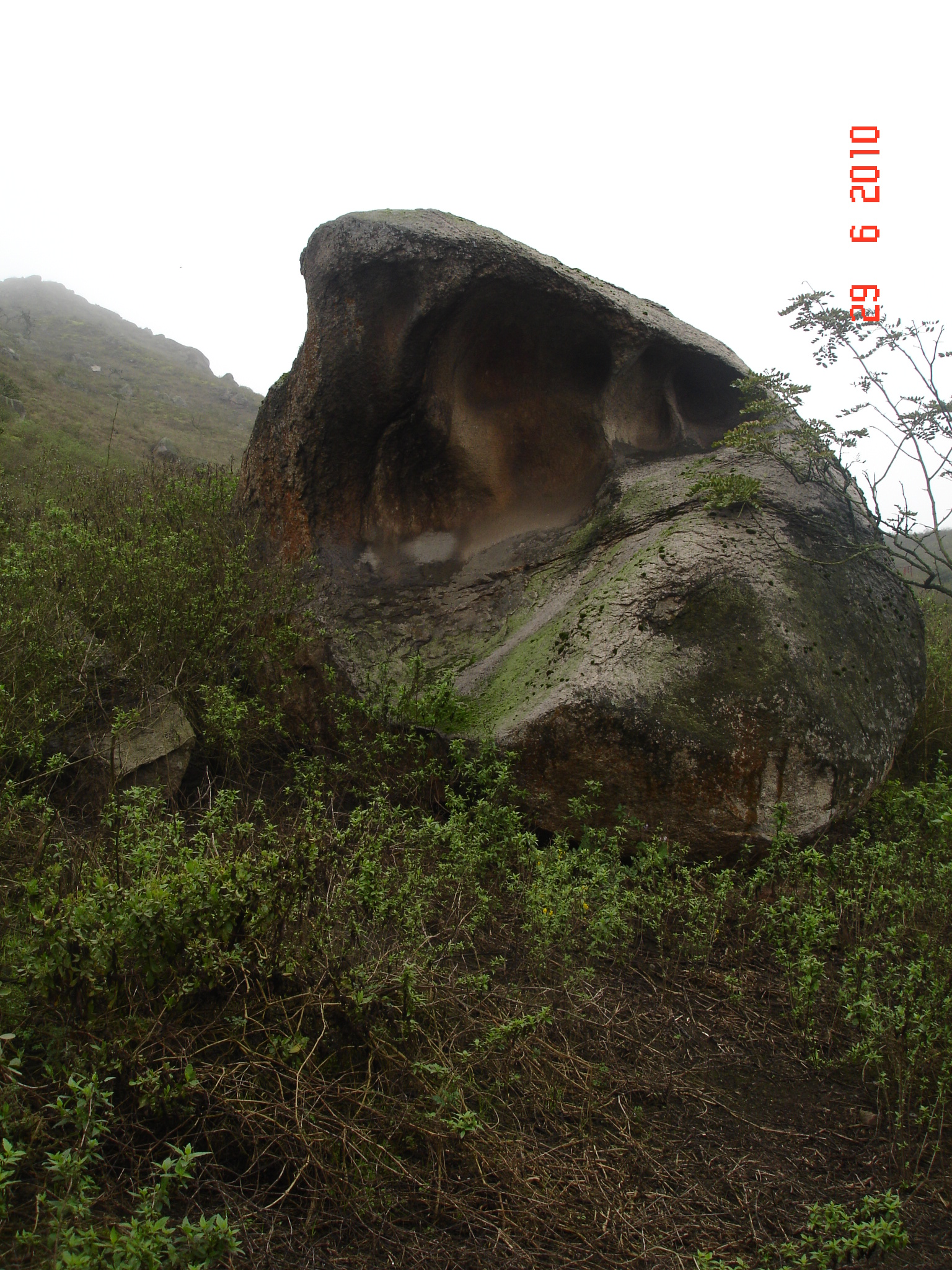 Lomas de Lachay